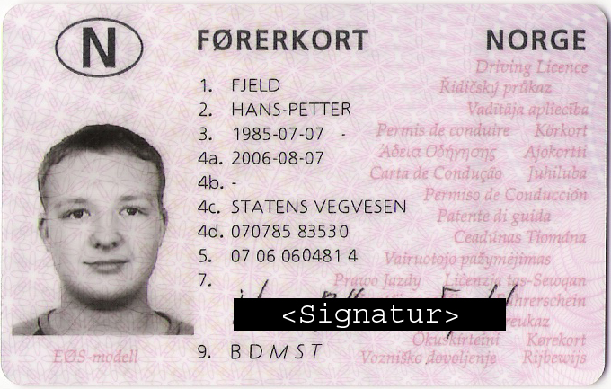 Nb:Dette er en scannet versjon av mitt norske førerkort. Dette er forsiden av kortet, signaturen min, personnummeret og førerkortnummeret er enten sensurert eller manipulert av naturlige grunner. En:This is a scanned version of my Norwegian drivers licence. This is the front of the card, my signature, social security number and licence number are censored or manipulated for privacy reasons.